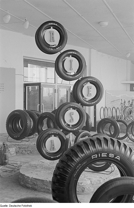 Original image description from the Deutsche Fotothek Gummireifen des VEB Reifenwerk Riesa auf der Leipziger Herbstmesse 1954